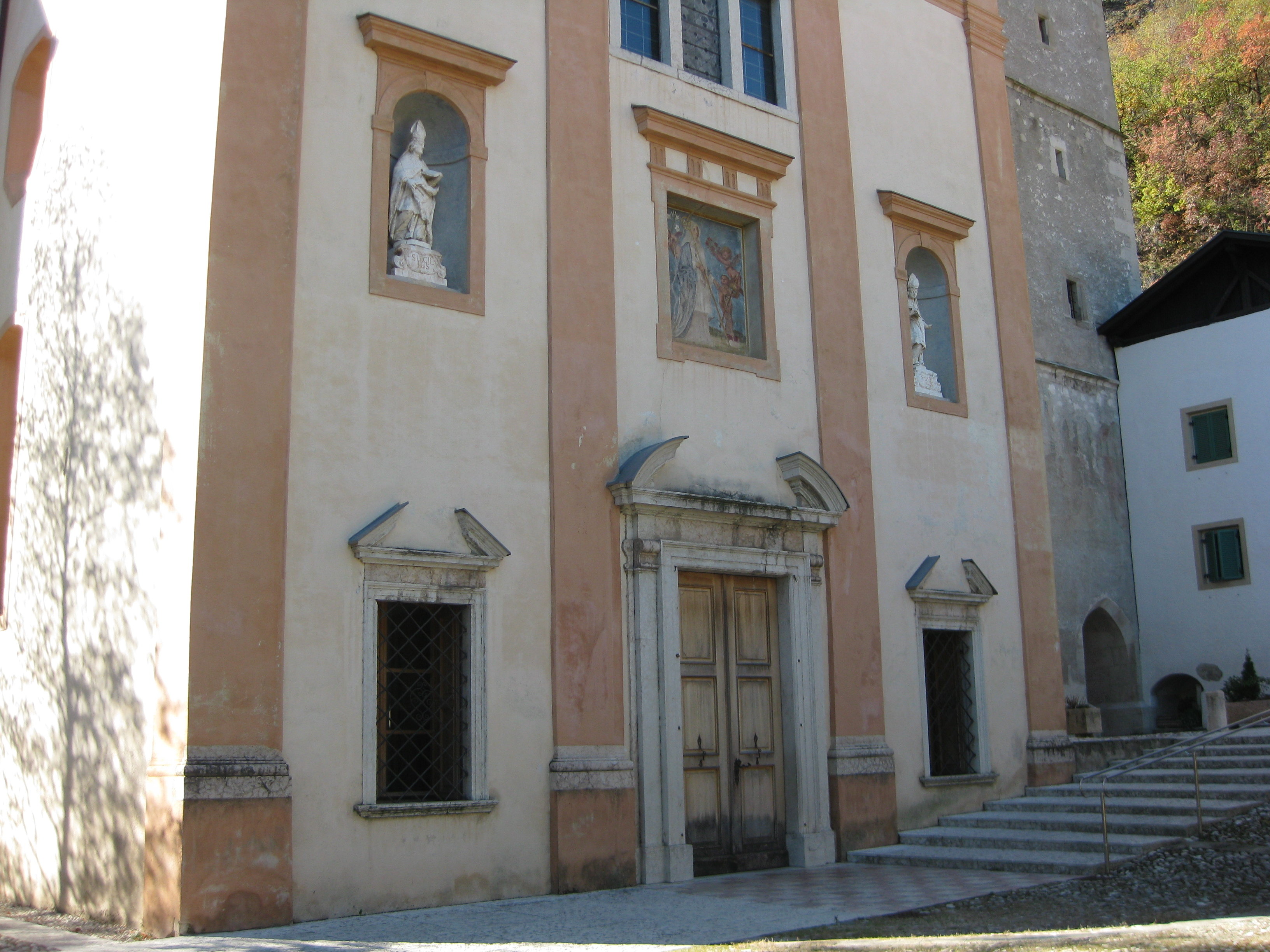 Pfarrkirche St. Gertraud in Margreid (Südtirol)